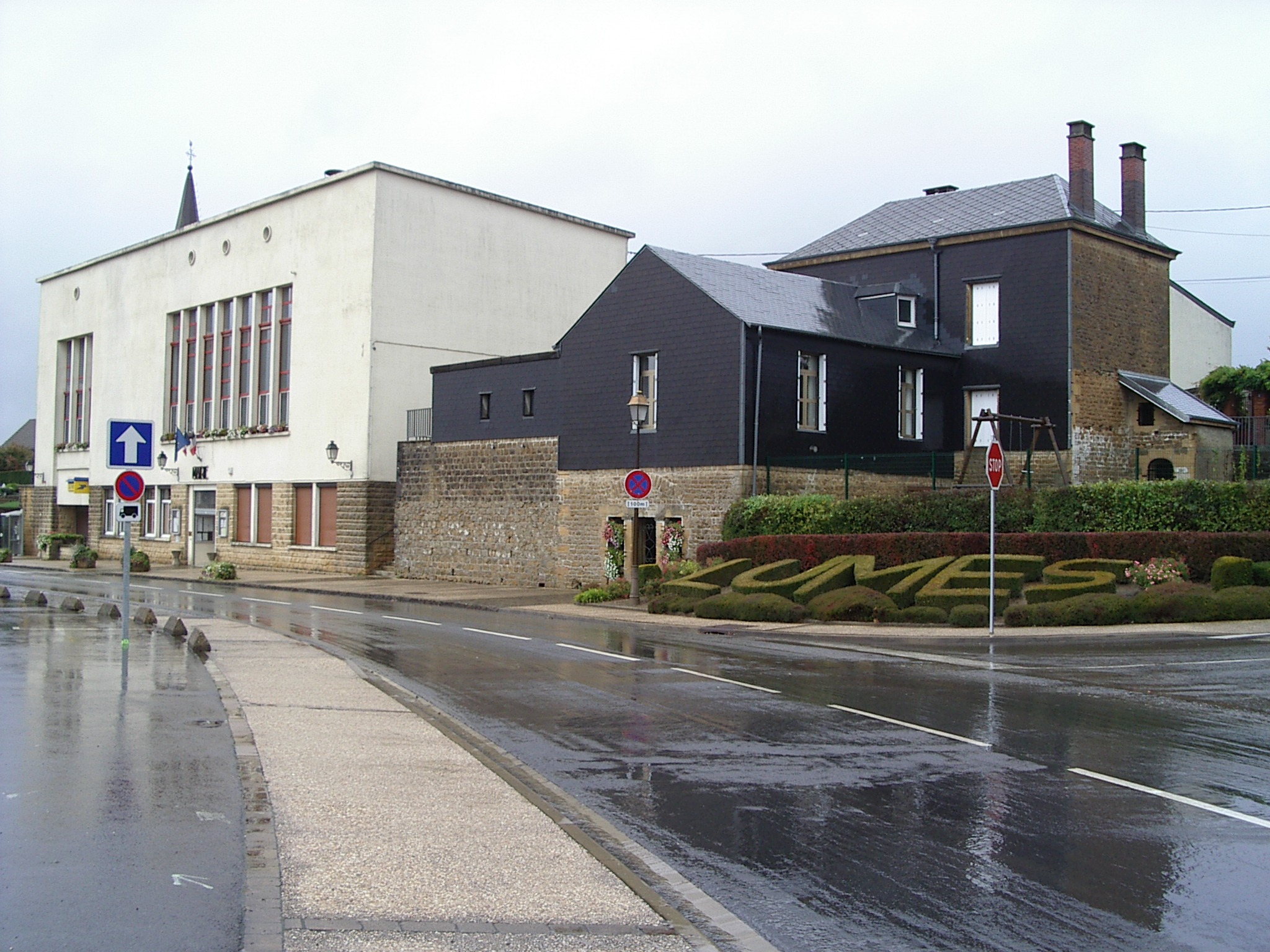 Lumes est une ville située dans le departement des Ardennes en France